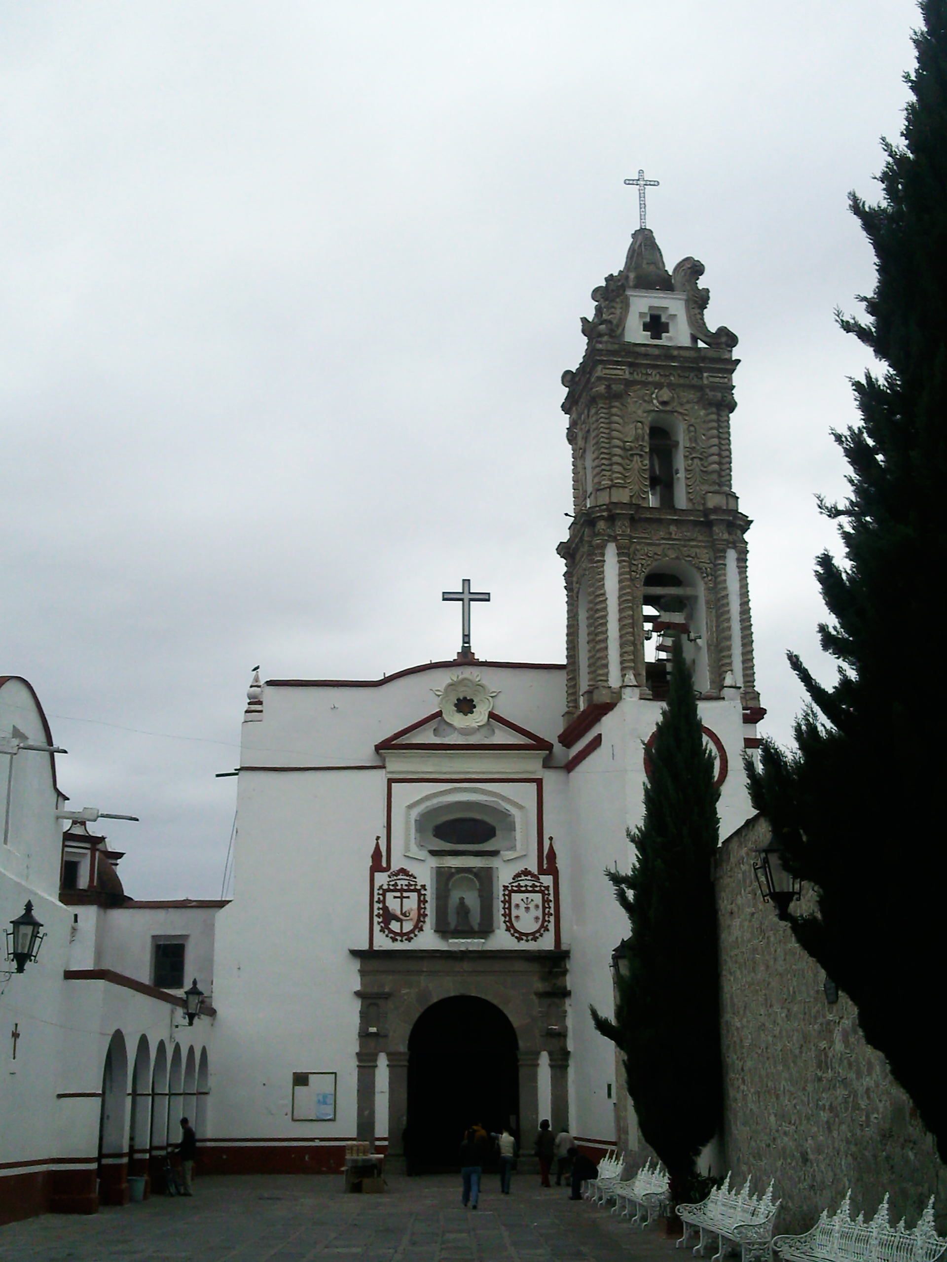 Templo de San Francisco en Huamantla, Tlaxcala